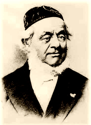 Rabbiner David Wolf Landau, Dresden